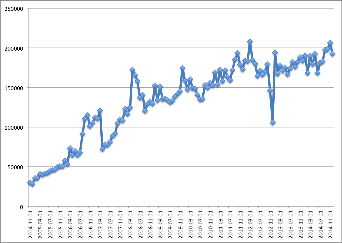 Vizitantoj al Lernu!, laŭ la datumo kiu troviĝas ĉe